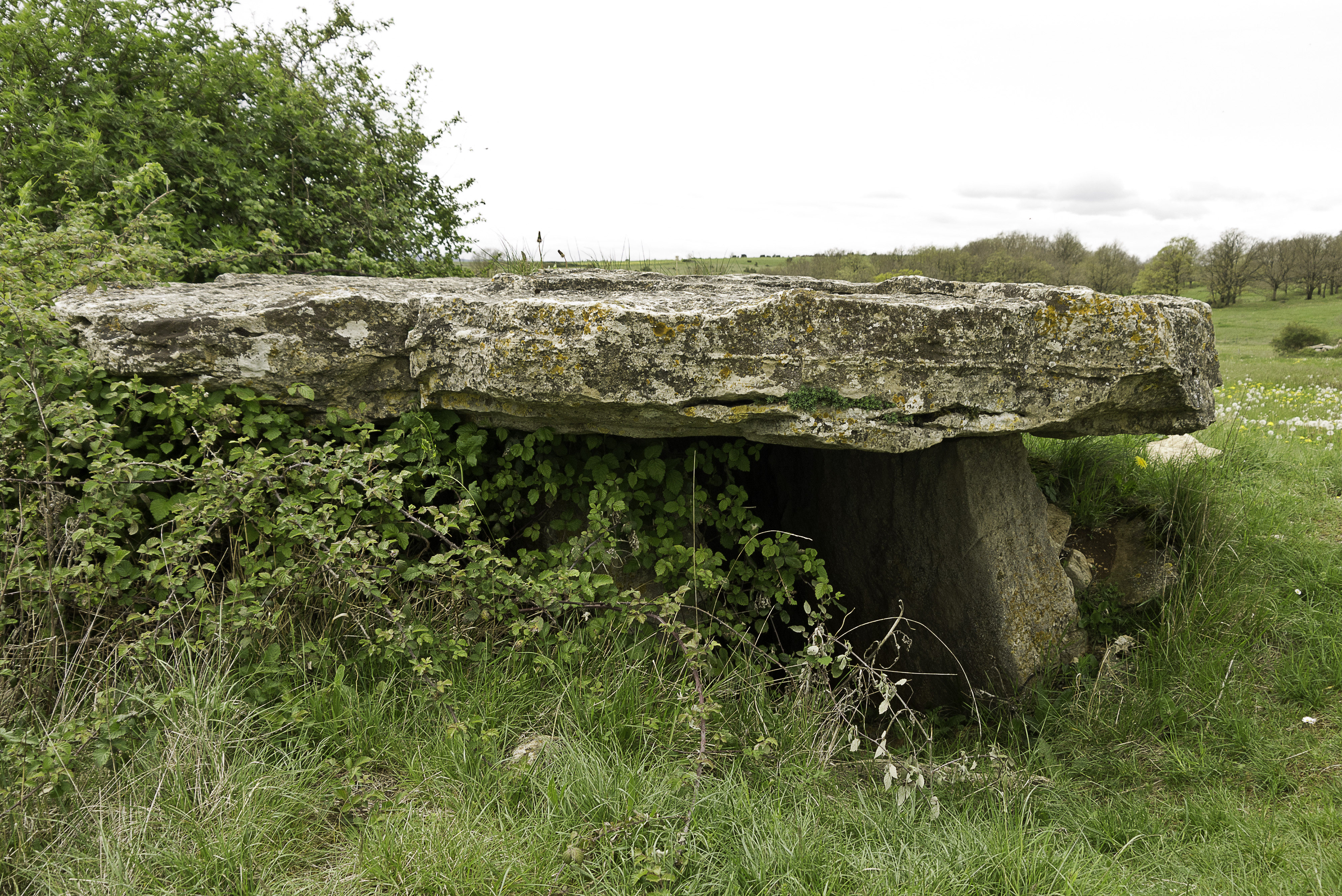 Dolmen de Saplous (Buzeins, Aveyron, France)